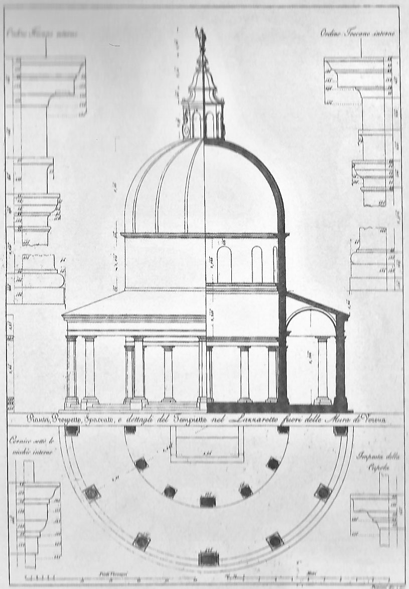 Prospetto e sezione della cappella del Lazzaretto di Verona, deisegnato da Francesco Ronzani